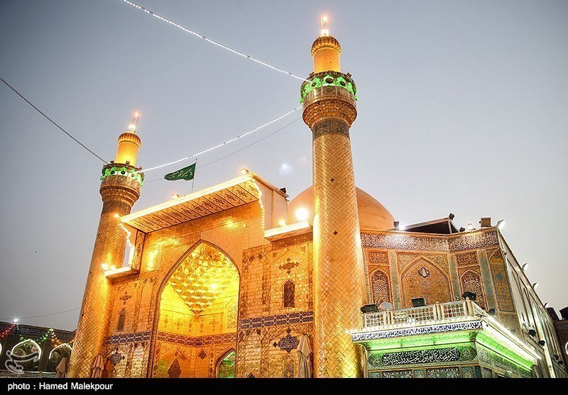 Imam Ali Mosque in Najaf